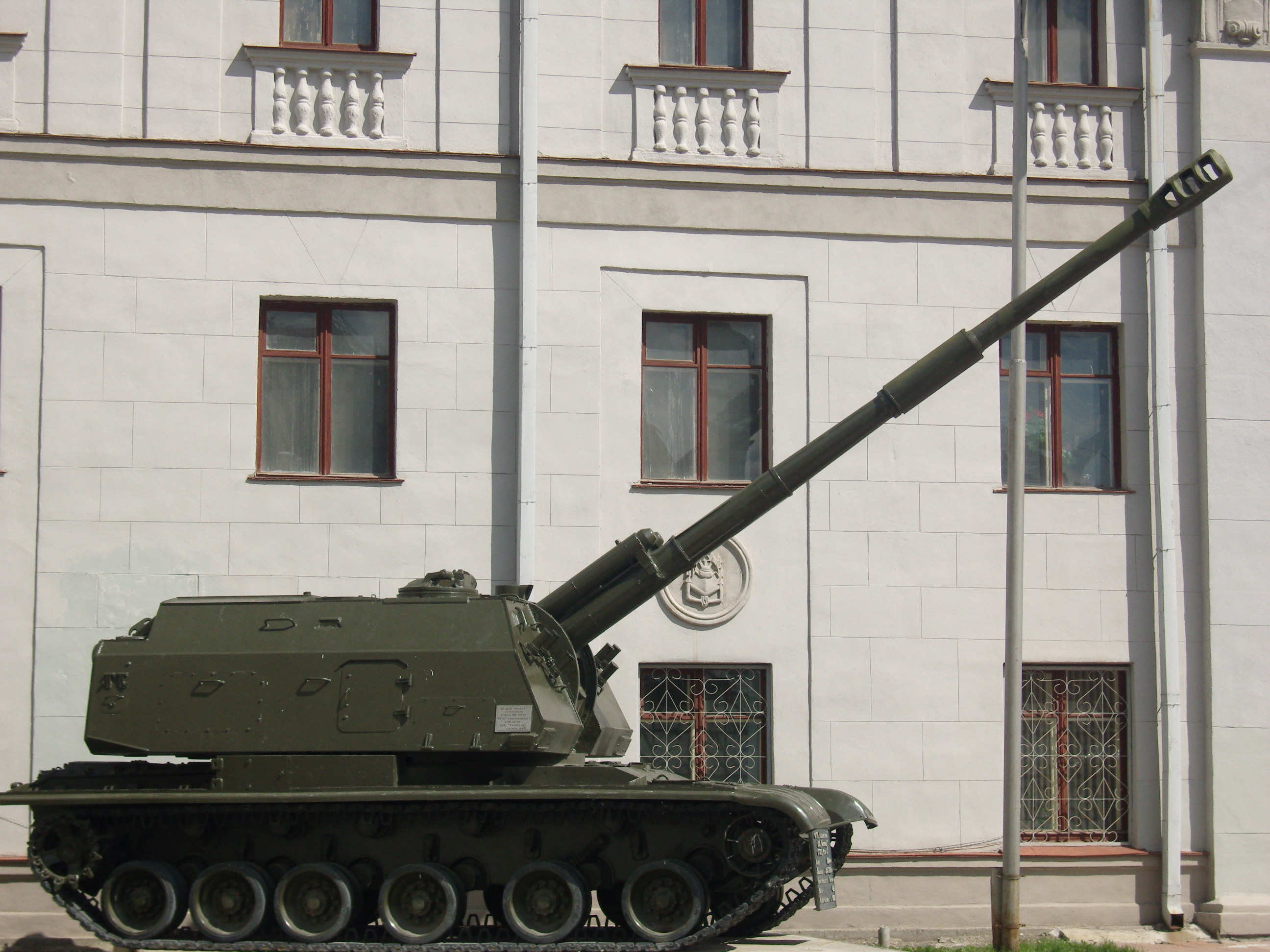 152-мм самоходная артиллерийская установка "Мста-С" (Г. Екатеринбург, Дом Офицеров)